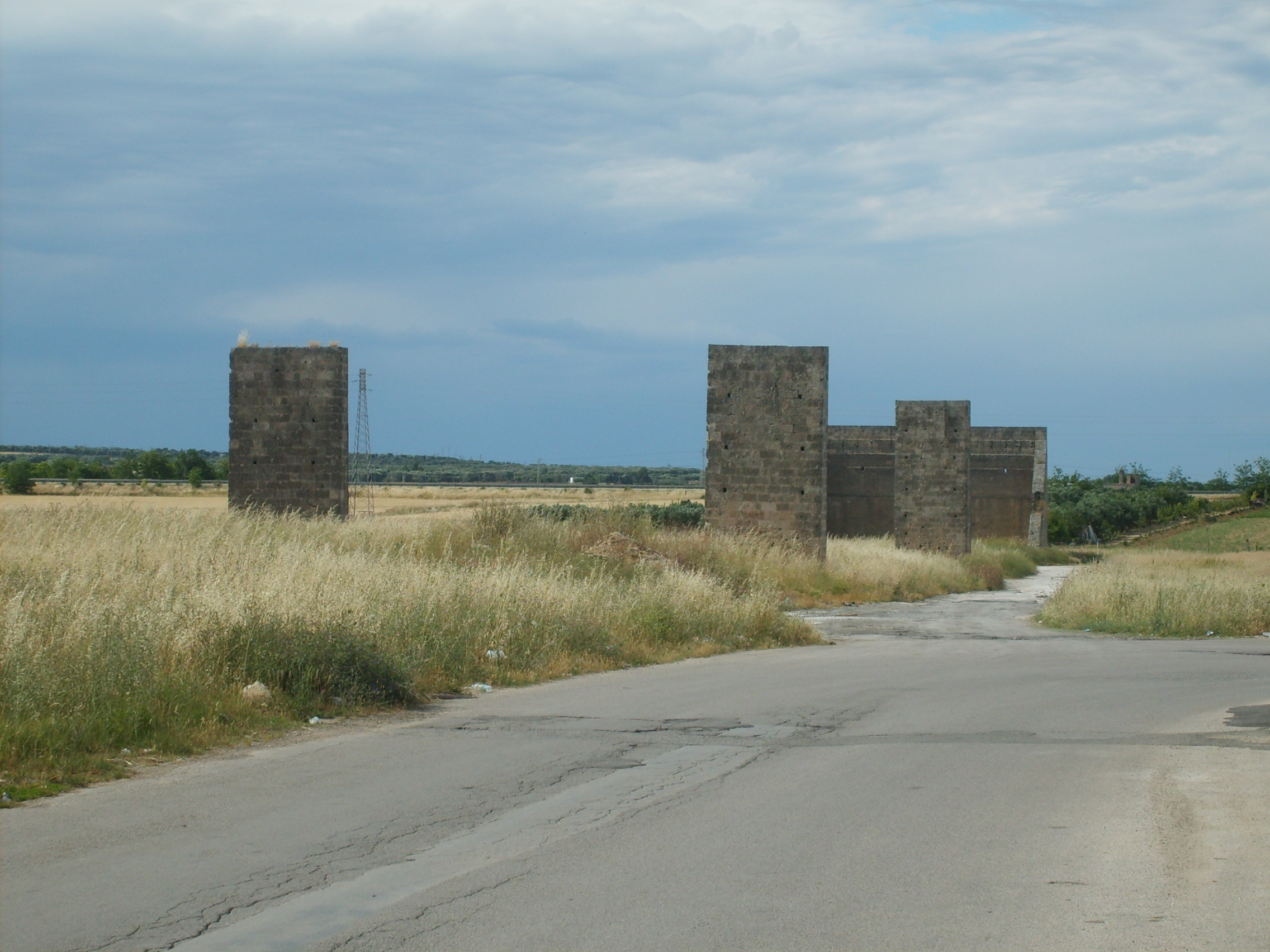 "Lu parapallu", Francavilla Fontana